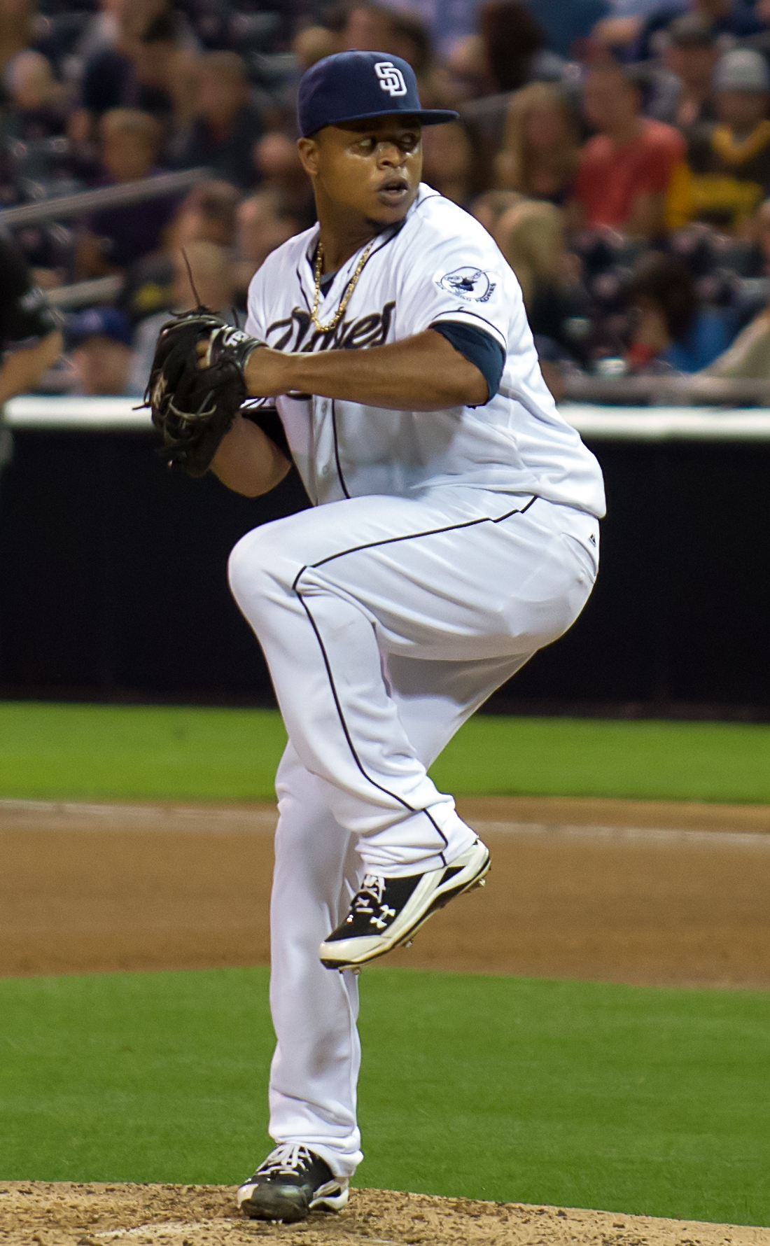 Edinson Vólquez